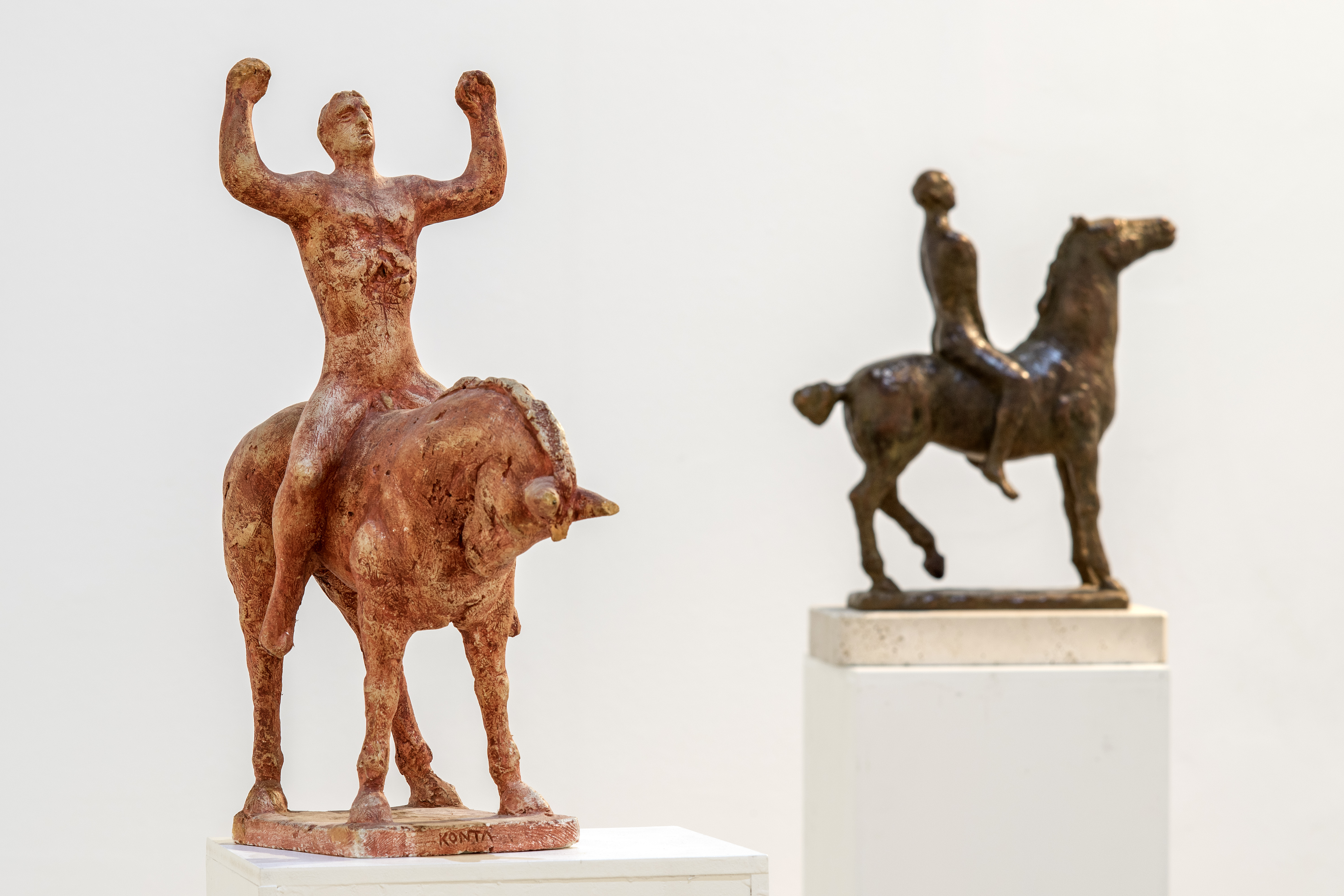 Detalj, izložba u Galeriji svetog Krševana, Šibenik, godina 2019